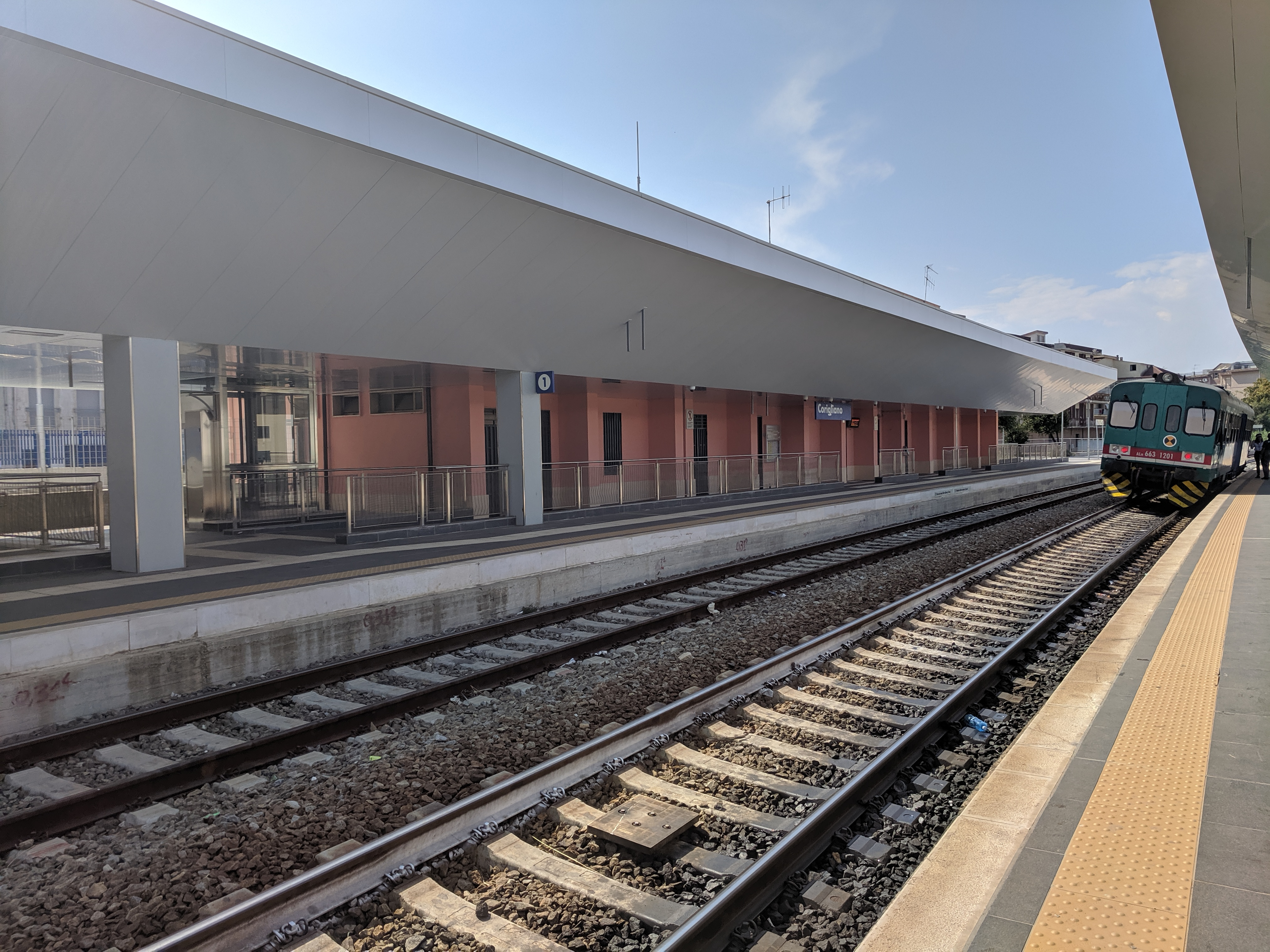 Vista binari della stazione di Corigliano